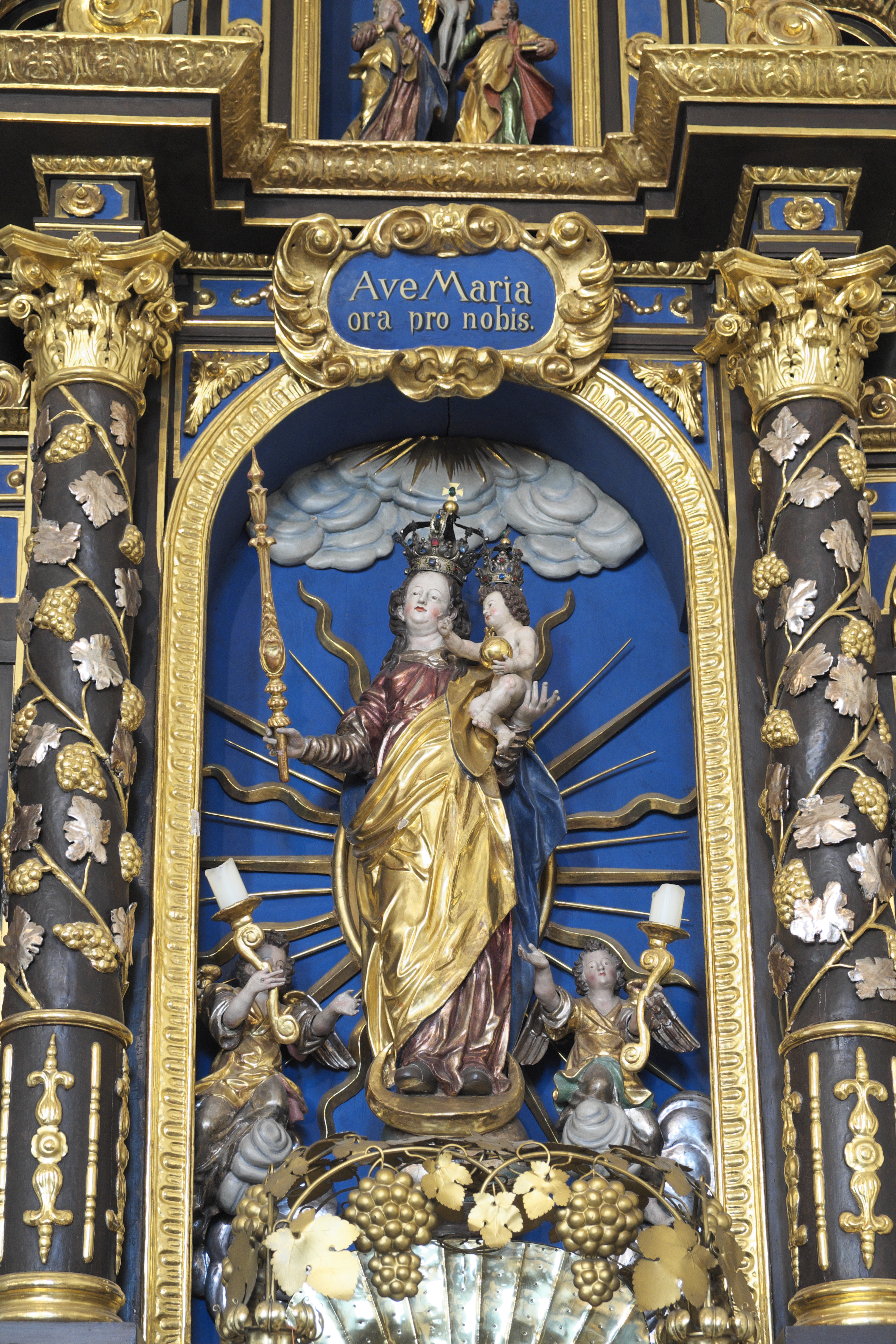 Katholische Pfarrkirche St. Valentin in Unterföhring im Landkreis München (Bayern/Deutschland), Marienaltar (nördlicher Seitenaltar), um 1680, mit Skulpturen der Mondsichelmadonna (Mitte), des heiligen Augustinus (links) und der heiligen Helena (rechts)